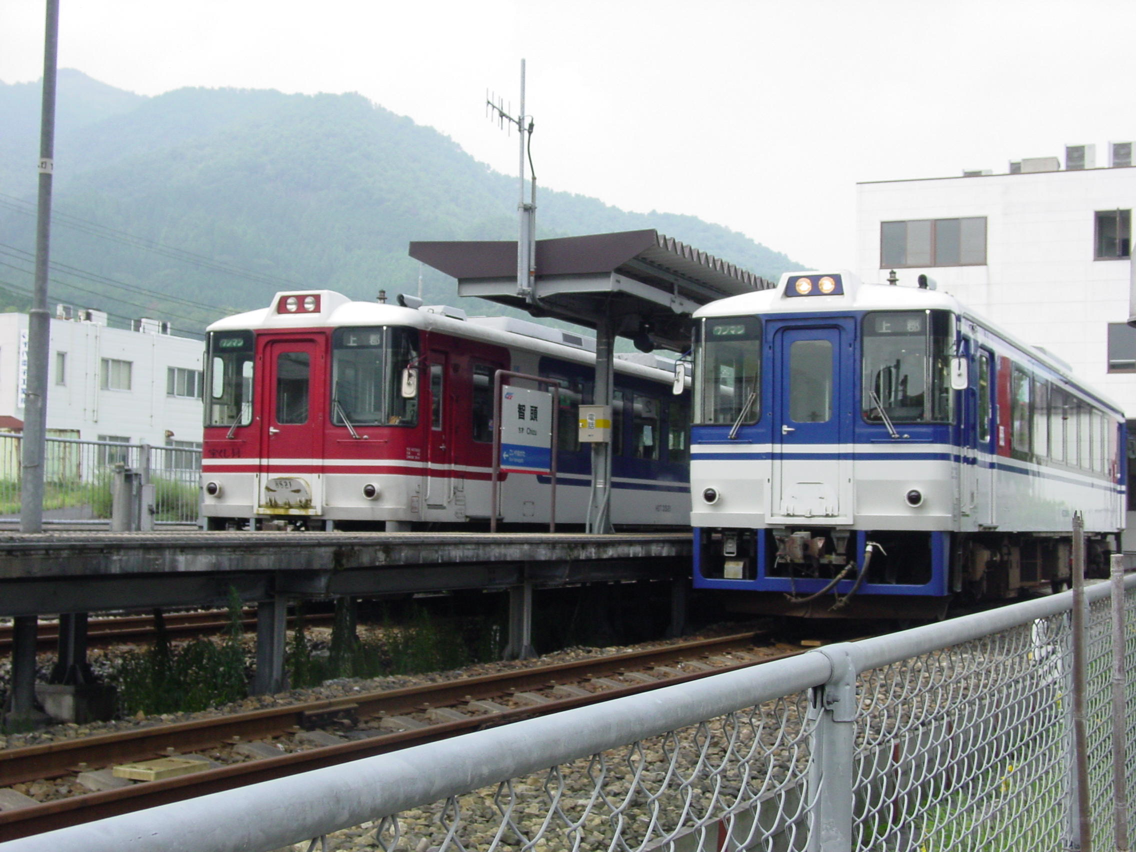 智頭駅にて顔を合わせるHOT3500形気動車。左はイベント仕様の3521。